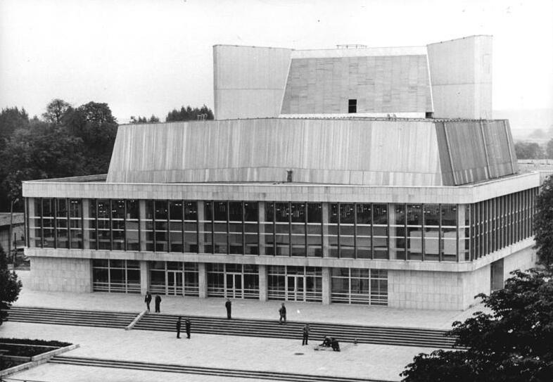 ADN-ZB-Müller 6.10.78 Bez. Frankfurt-Oder: Das neue Kulturhaus von Schwedt wurde am 6.10.78, dem Vorabend des Nationalfeiertages der DDR, seiner Bestimmung übergeben. Am 7.10.78 nimmt das neugegründete Theater der Stadt mit Shakespears "Was ihr wollt" in diesem Kulturzentrum den Spielbetrieb auf. Der repräsentative Bau verfügt über einen großen und einen kleinen Saal mit 800 bzw. über 100 Plätzen für Theater-, Konzert- und Filmveranstaltungen und bietet den Volkskunstzirkeln der Stadt Räume und Ateliers. (siehe auch 16N)"